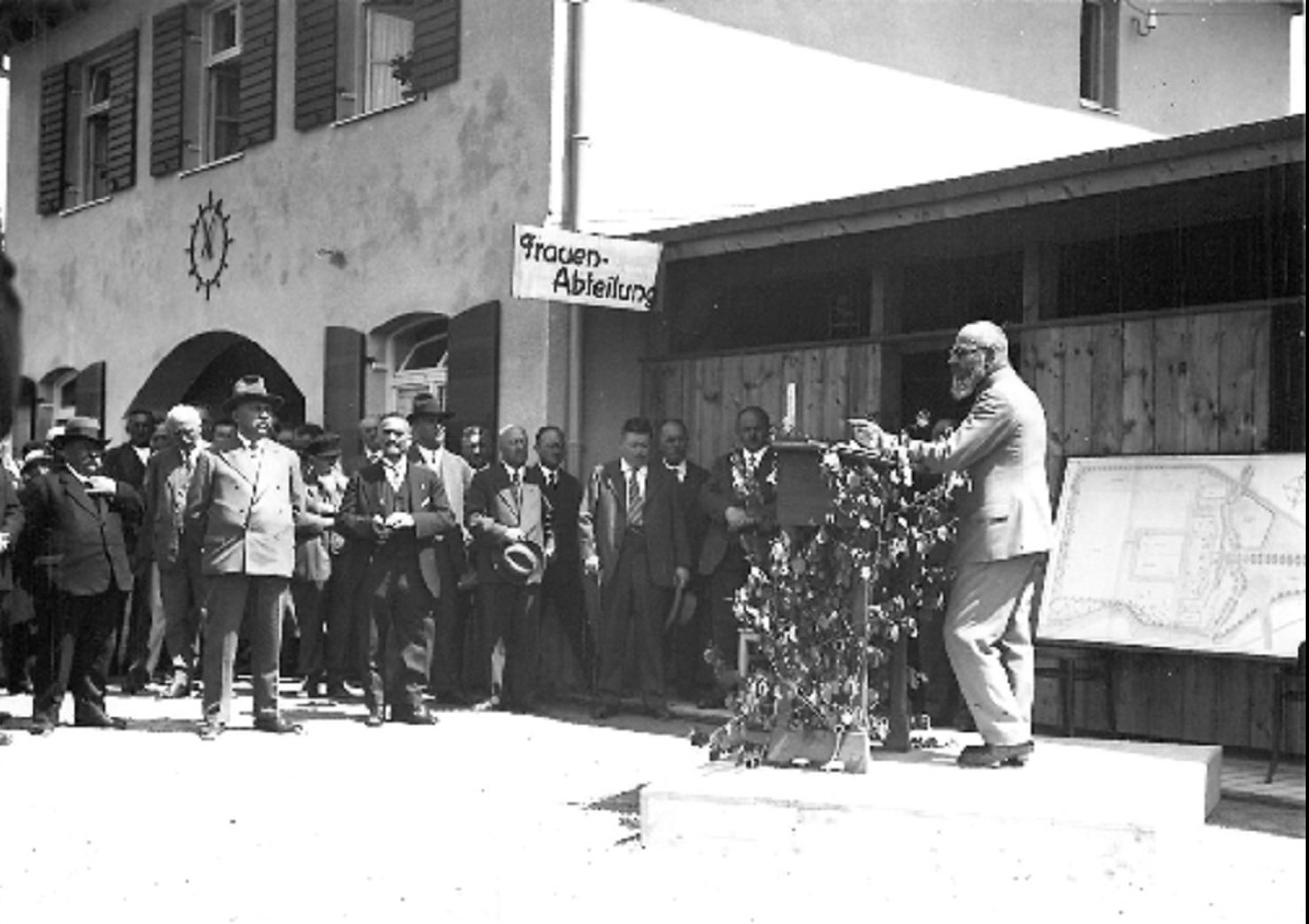 Stadtbad in Kempten. Bild vom Bau und Eröffnung des Bades. Redner ist Bürgermeister Otto Merkt.